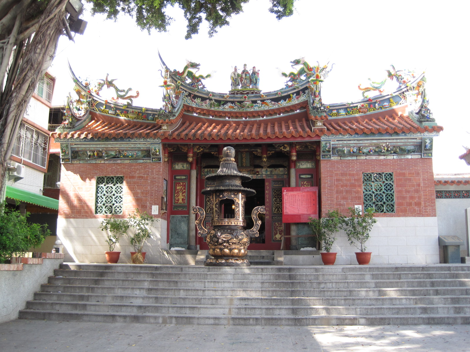 臺南市大觀音亭